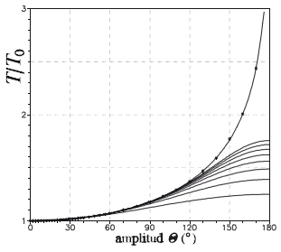 Solución exacta del péndulo simple